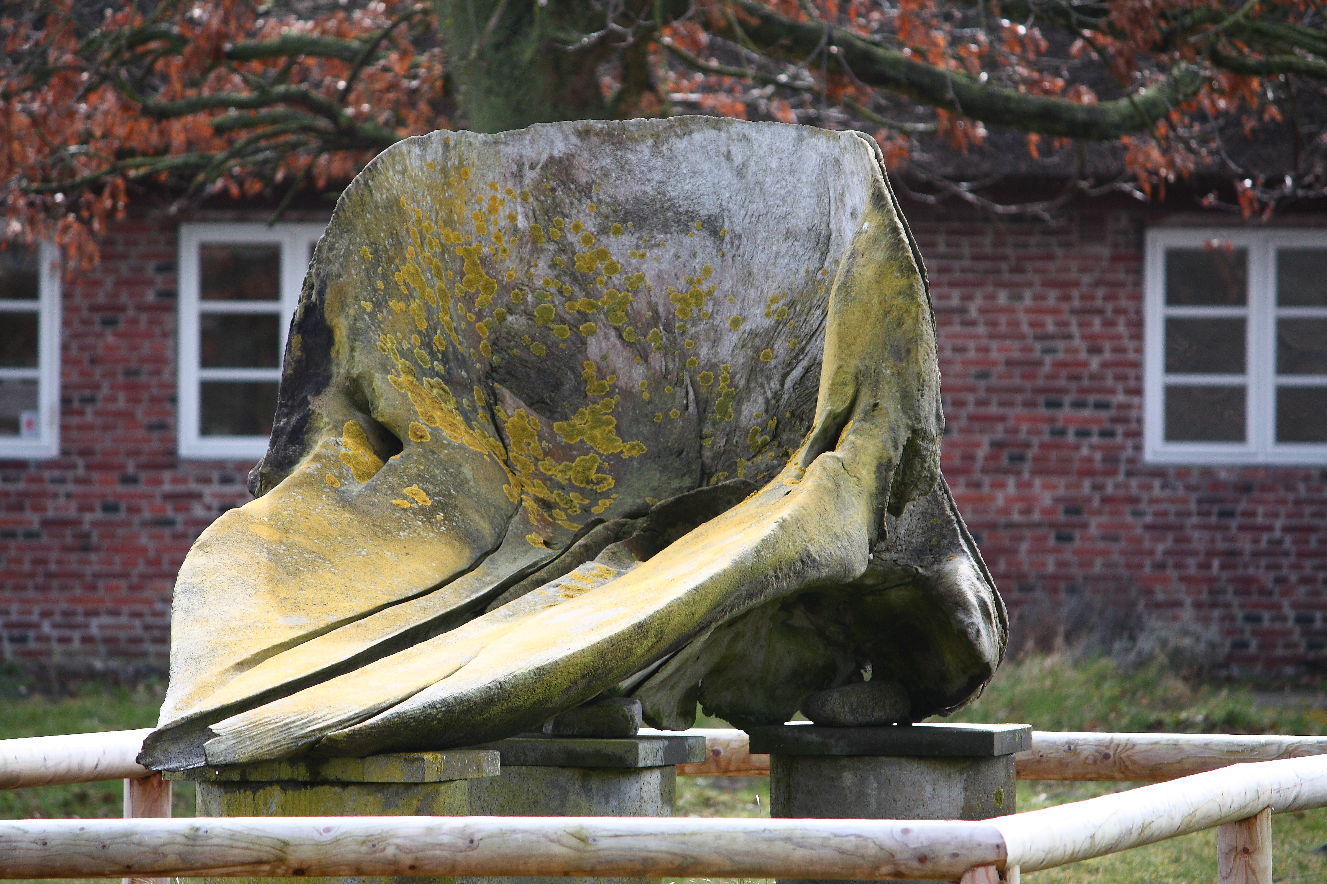 Ein Walschädelknochen (Pottwal, Physeter macrocephalus), Fotografiert in Kongsmark auf Römö